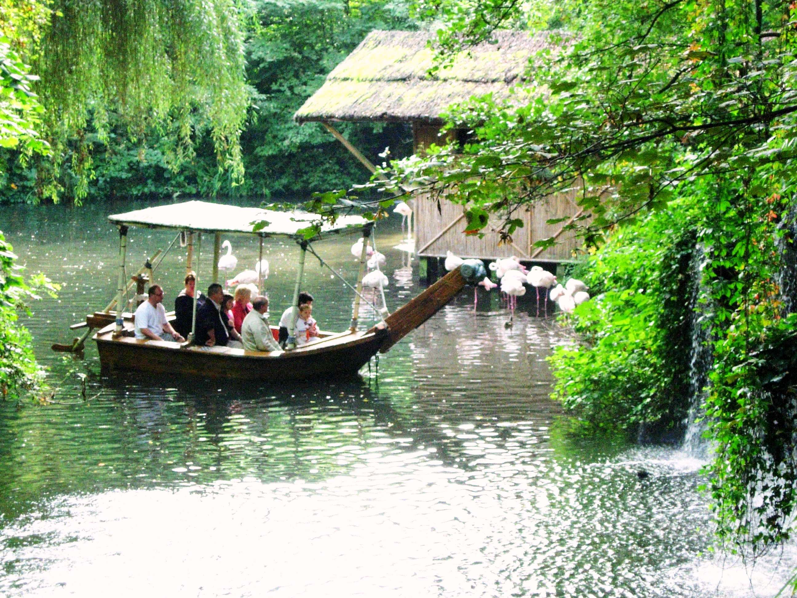 Le Voodoo River @Bellewaerde. En 2011 cette attraction a recu une thématisation nouvelle et un nouveau nom: Jungle mission.